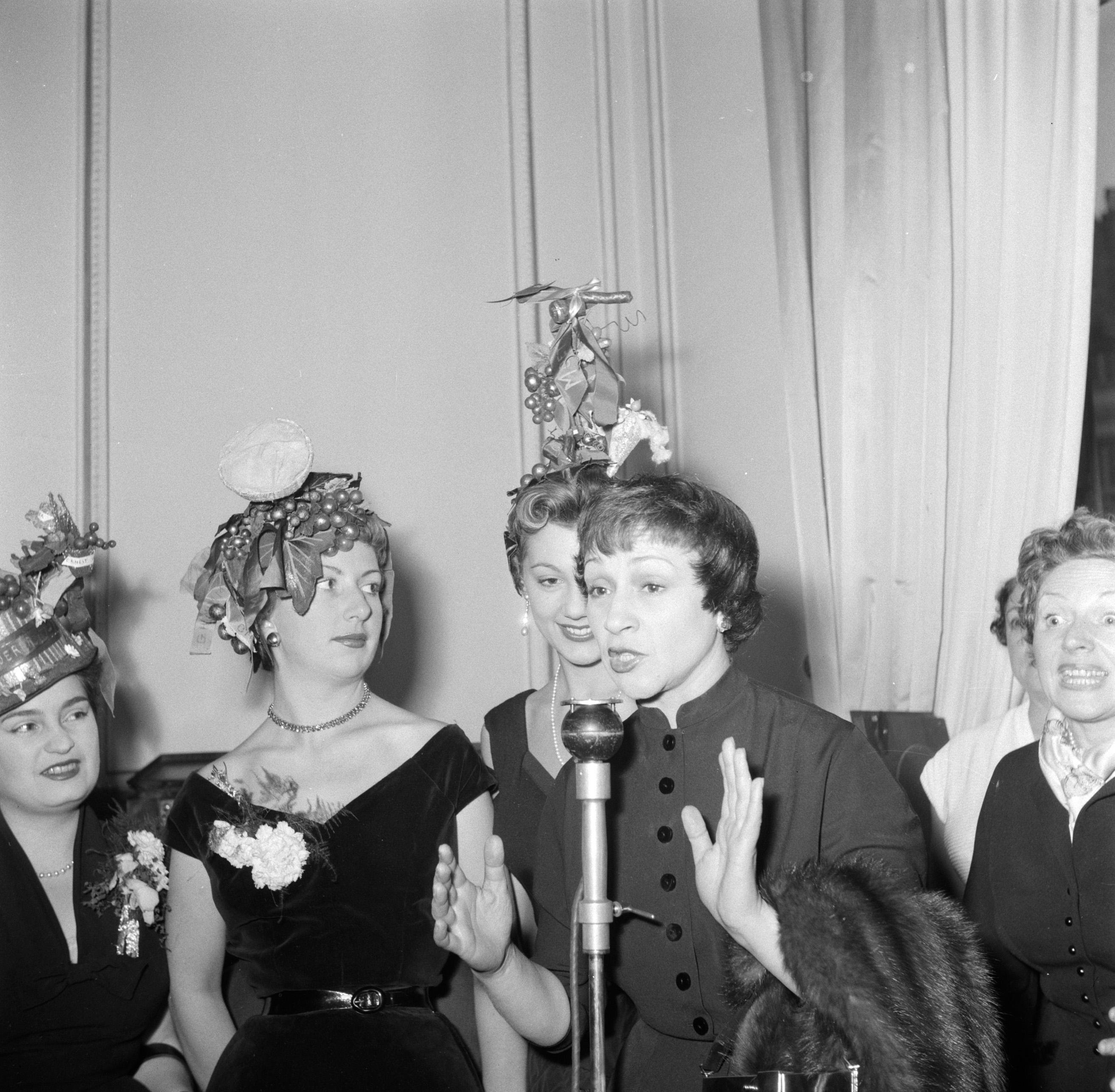 Collectie / Archief : Fotocollectie Van de Poll Reportage / Serie : Feest van Sainte Cathérine in Parijs, de feestdag van de Franse modehuizen op 25 november Beschrijving : Aankondiging van de bekendmaking van de 'Koningin van het Huis door de actrice en zangeres Renée Lebas Annotatie : In Parijs wordt het feest van Sainte Cathérine gevierd door meisjes die op hun 25ste nog ongetrouwd zijn, en werkzaam zijn in de mode-industrie. Sainte Cathérine is hun schutspatrones Datum : 1930 Locatie : Frankrijk, Parijs Trefwoorden : actrices, feestdagen, feesten, hoofddeksels, modehuizen Fotograaf : Poll, Willem van de Auteursrechthebbende : Nationaal Archief Materiaalsoort : Negatief (6x6) Nummer archiefinventaris : bekijk toegang 2.24.14.02 Bestanddeelnummer : 254-0163